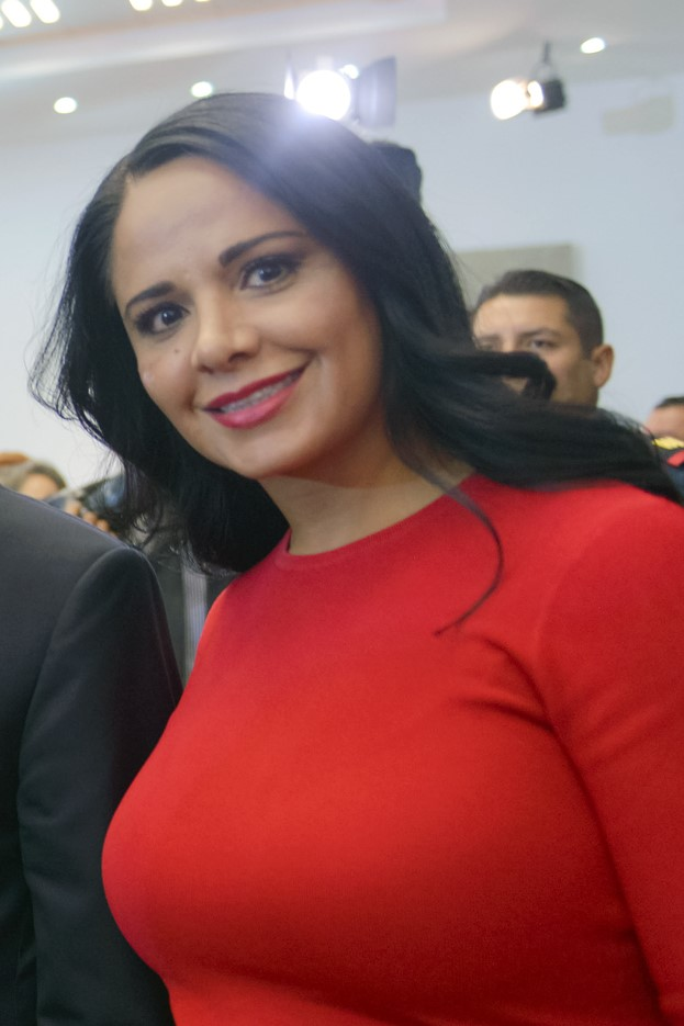 Lilia Merodio Reza, senadora de México de 2012 a 2018